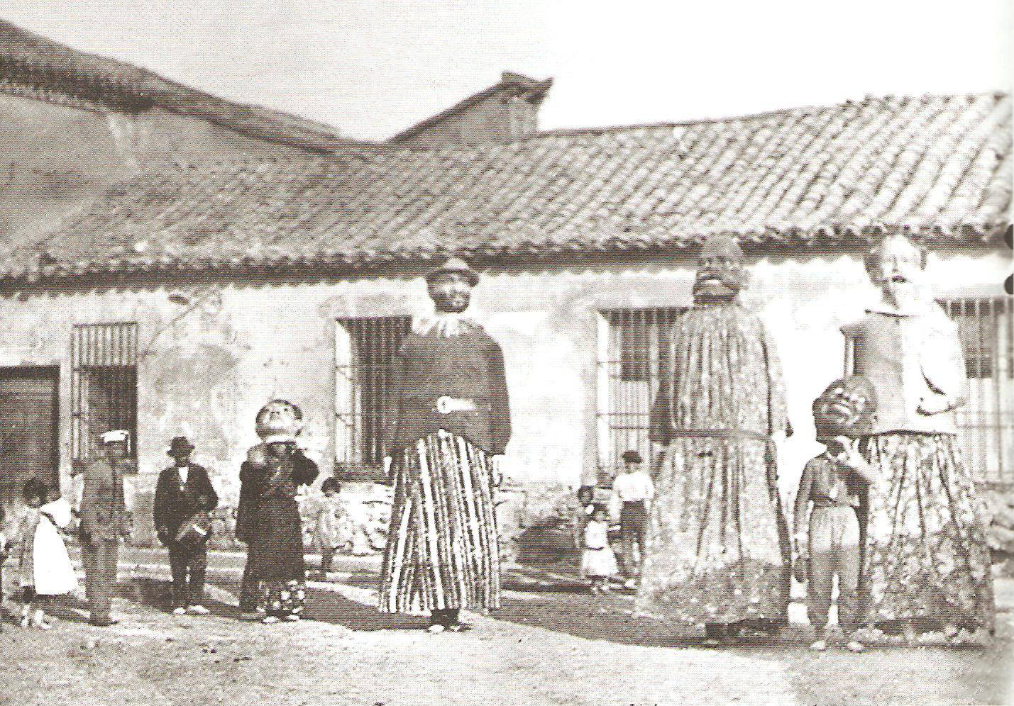 Gigantes y cabezudos de Alcalá de Henares, fotografía tomada el 25 de agosto de 1918 por Miguel Pereira Sánchez. Los gigantes representan (de izquierda a derecha) a los personajes: Sancho Panza, El negrazo y Don Quijote de la Mancha.